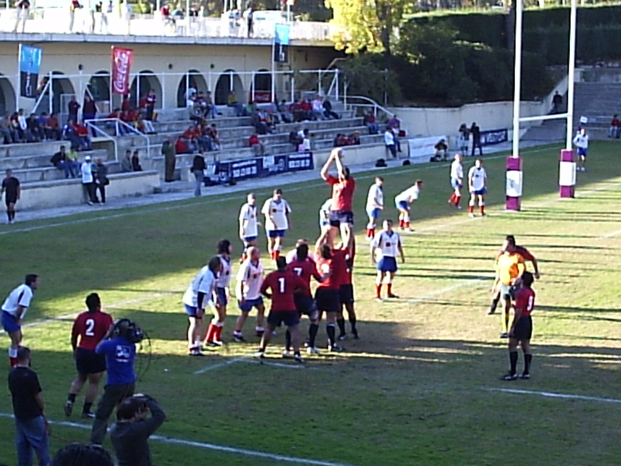 España contra la República Checa en Ciudad Universitaria